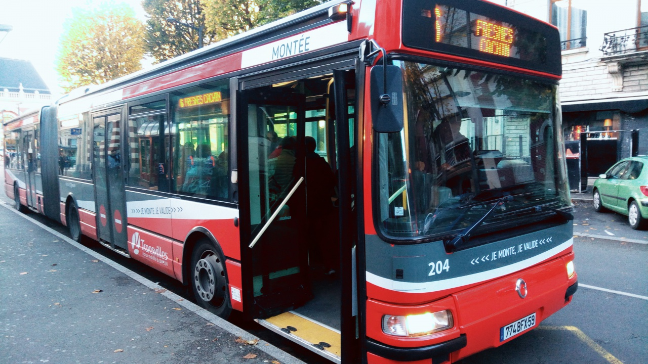 Agora L N°204 à destination de Fresnes Cachin - Gare De Valenciennes